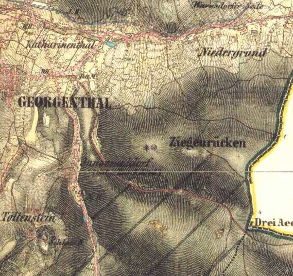 Okolí dnešní osady Lesné - II. vojenské mapování